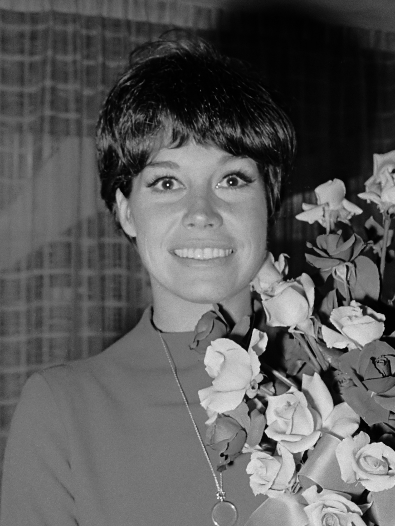 Aankomst Mary Tyler Moore (uit Dick van Dijck show) op Schiphol. Mary Tyler Moore met bloemen 4 oktober 1967